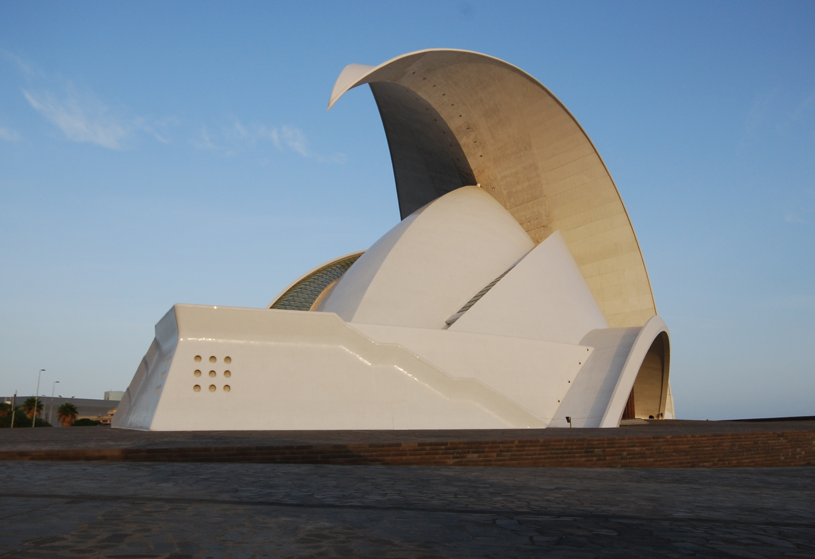 Auditorio de Tenerife bei Sonnenuntergang